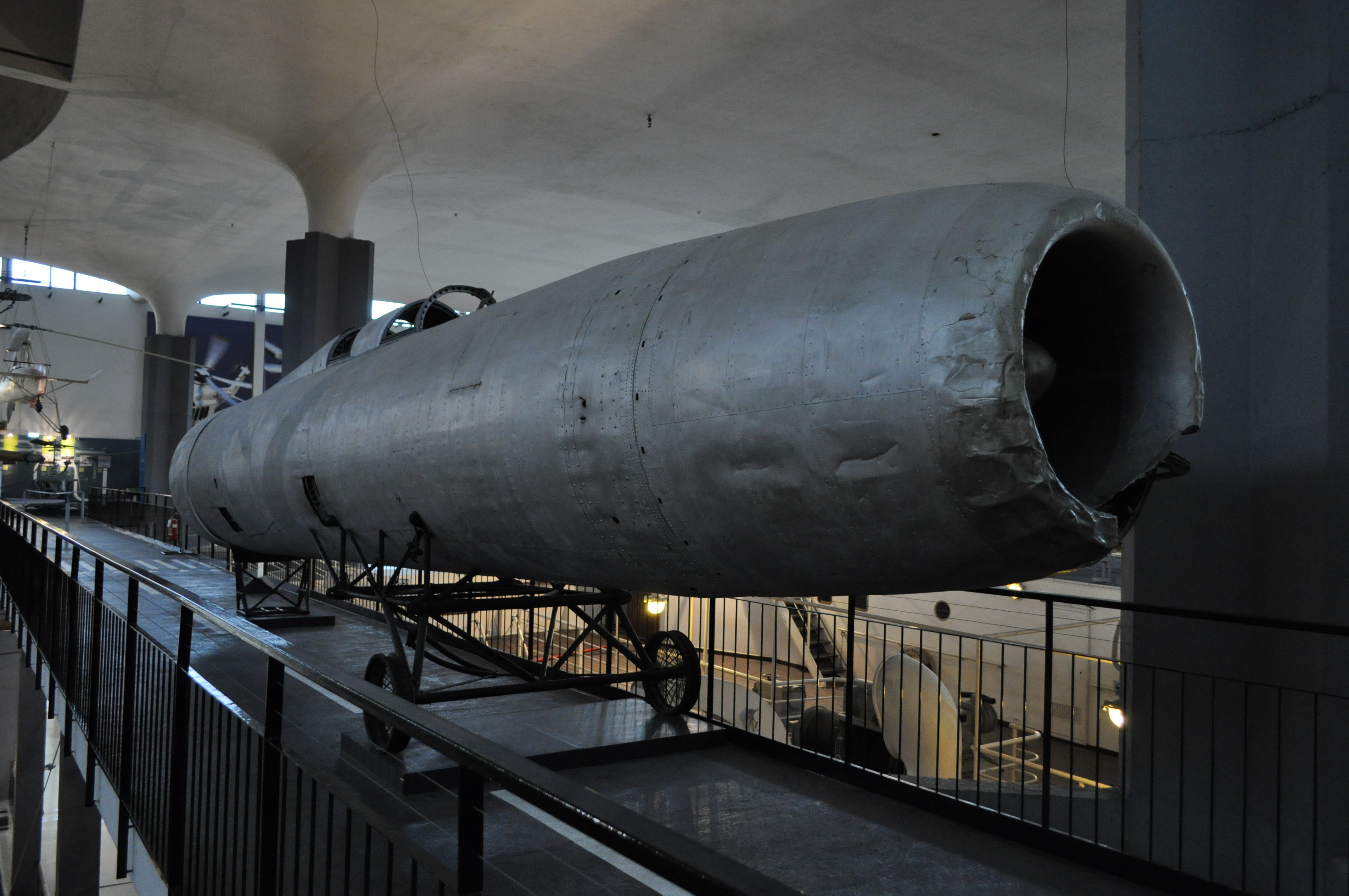 Prototipo fusoliera Campini-Caproni C.C.2.